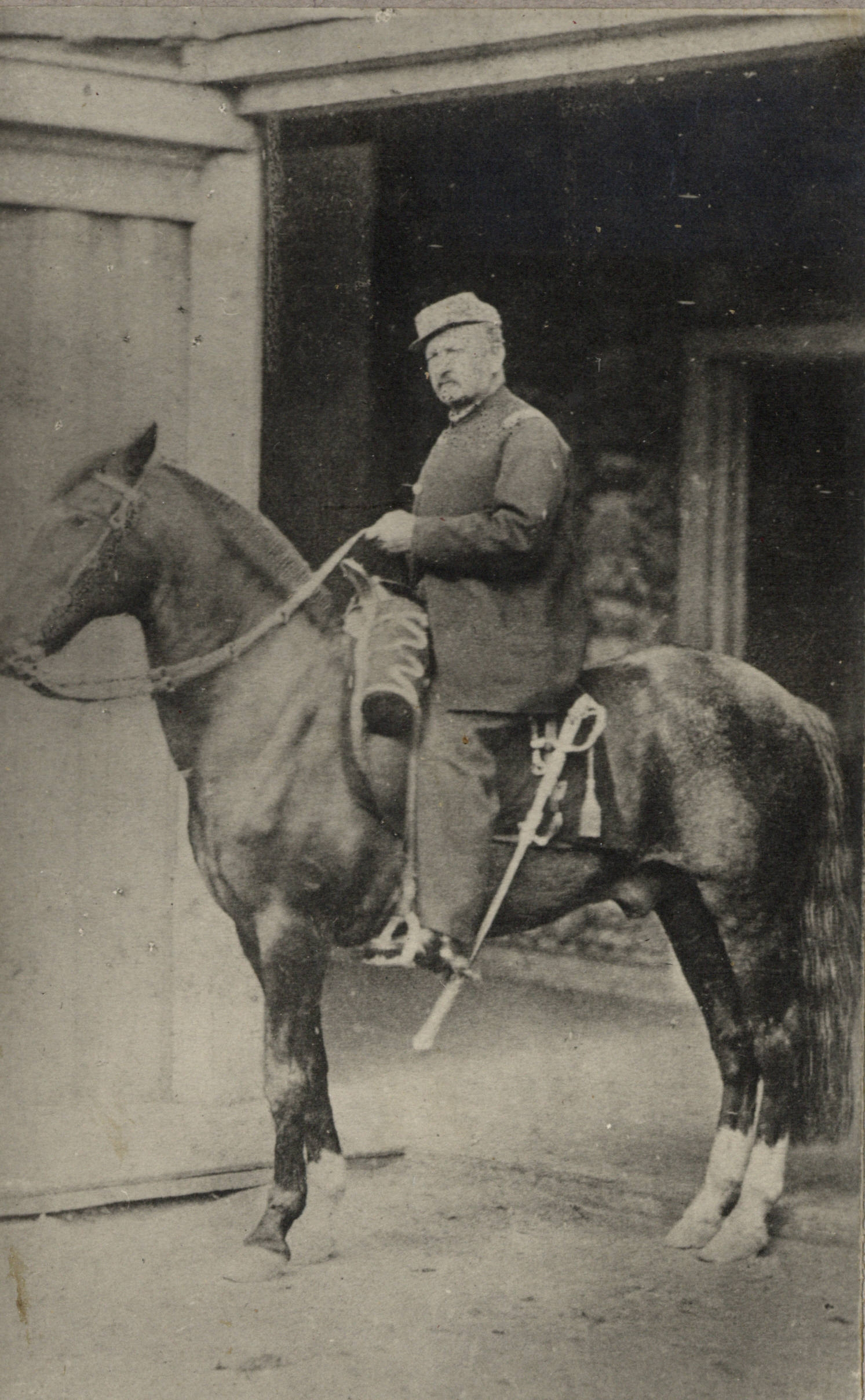 Manuel Baquedano, General en Jefe del Ejército Chileno, fotografía tomada en Tacna después de la victoria de Arica. Baquedano viste su uniforme que usó durante toda la campaña y monta a su caballo de batalla "Diamante"